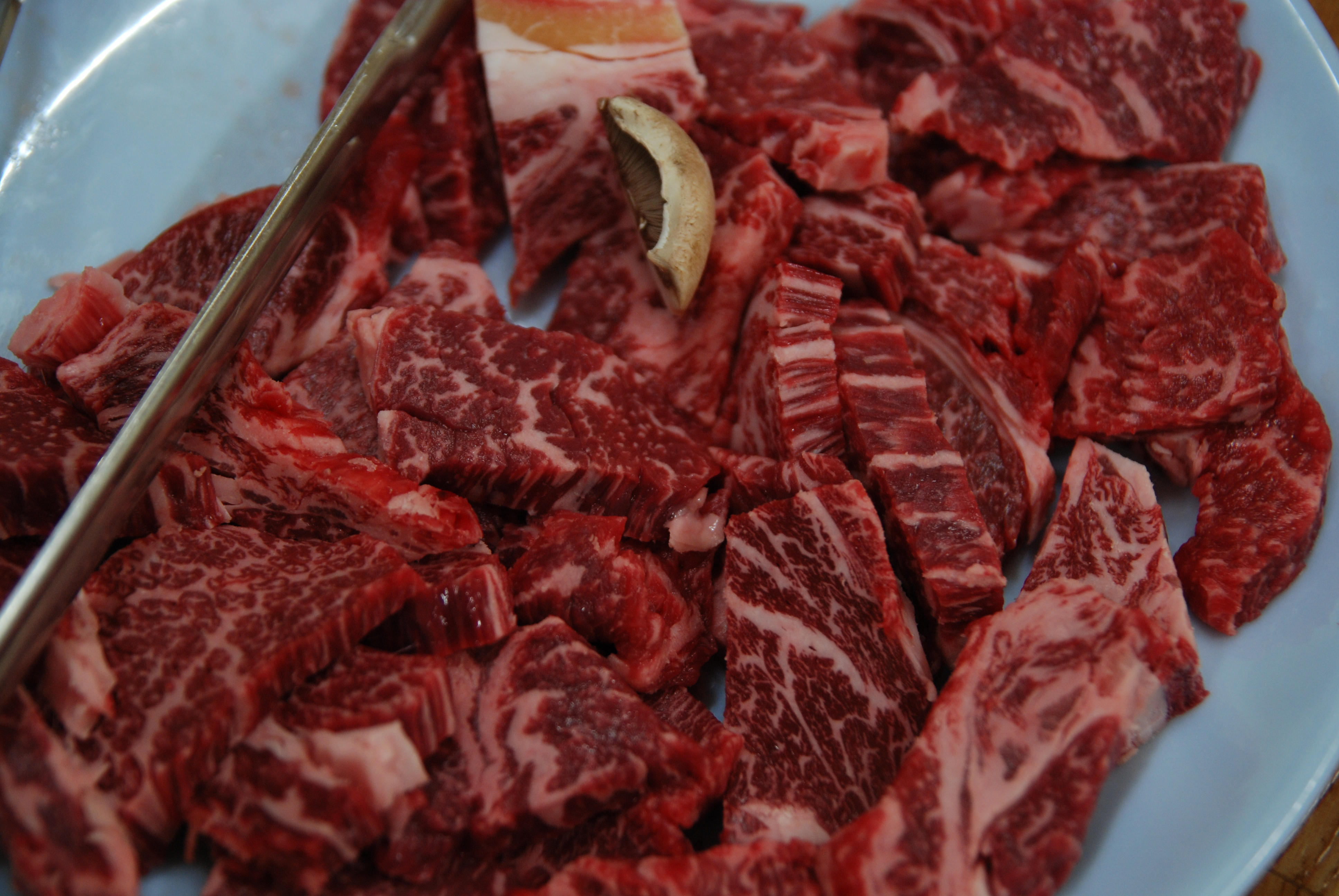 이 접시로 몇 접시를 먹었는지... 기억이 안 난다.